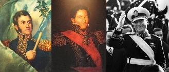 San Martín - Rosas - Perón, línea histórica nacional argentina